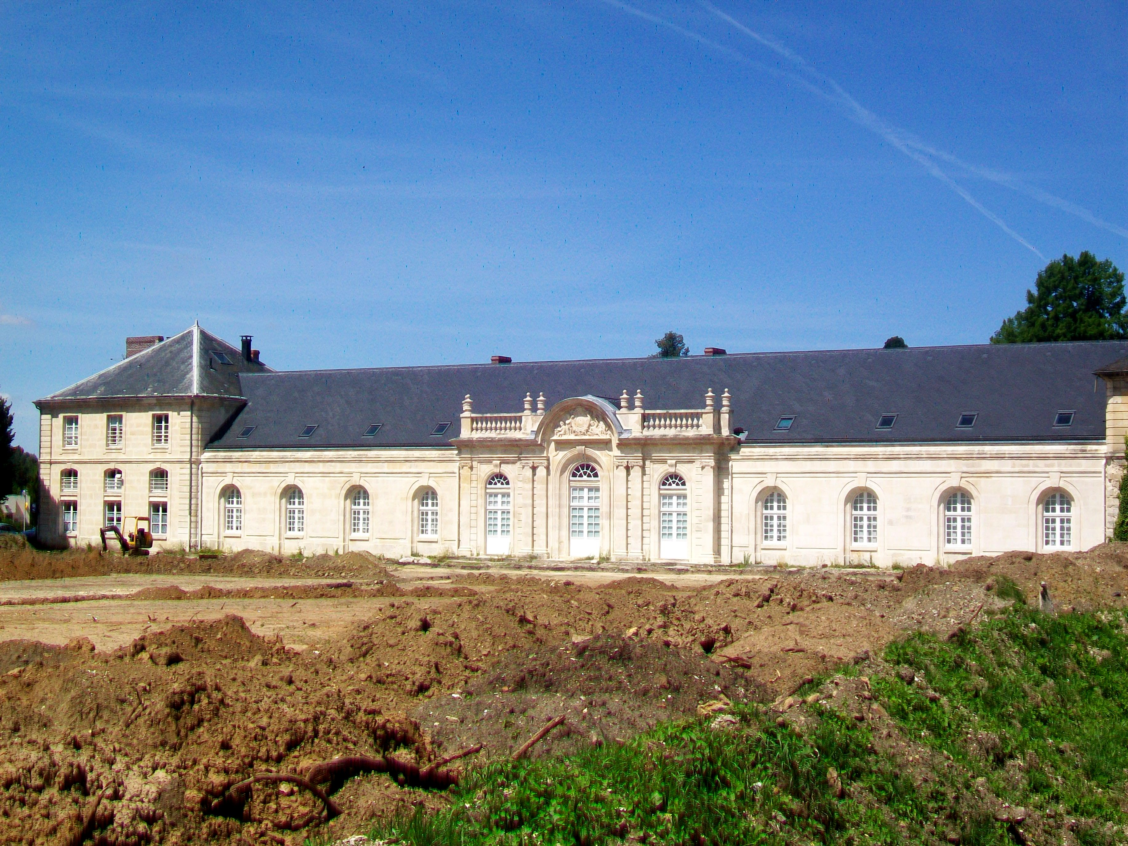 Vue rapprochée de la partie restaurée de la façade sud des communs du château.